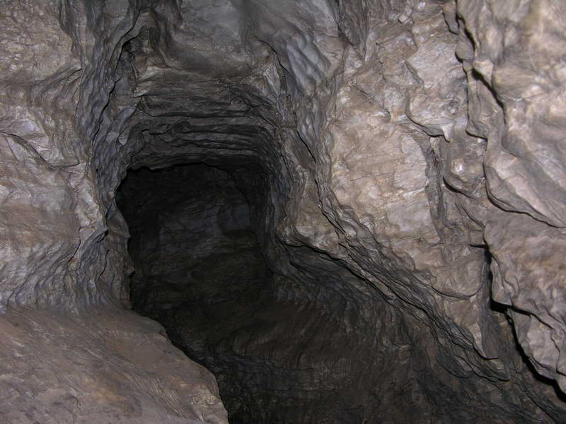 Одна из пещер горы Большое Богдо